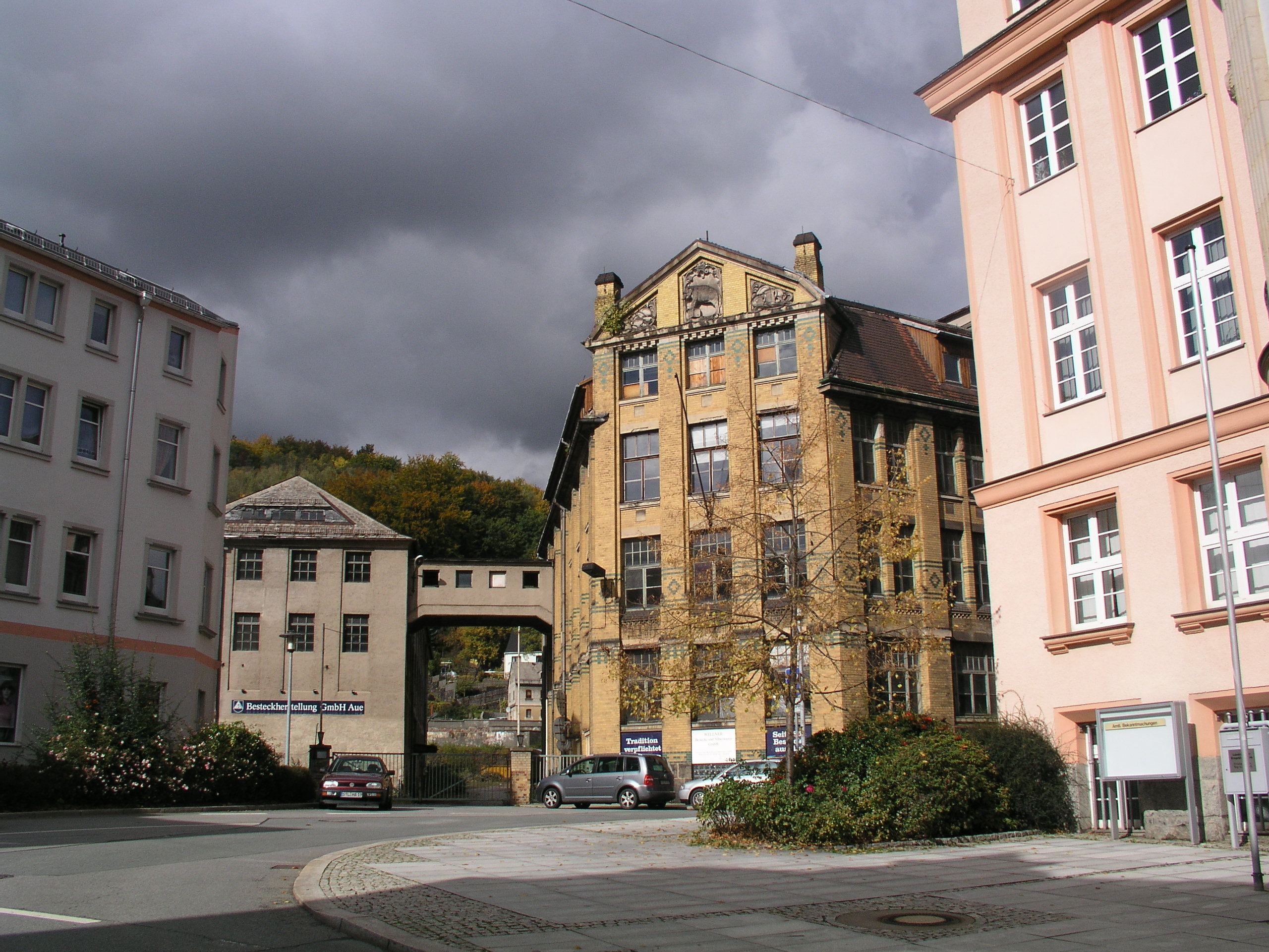 Einfahrt zum Wellner-Areal in der Marie-Müller-Straße